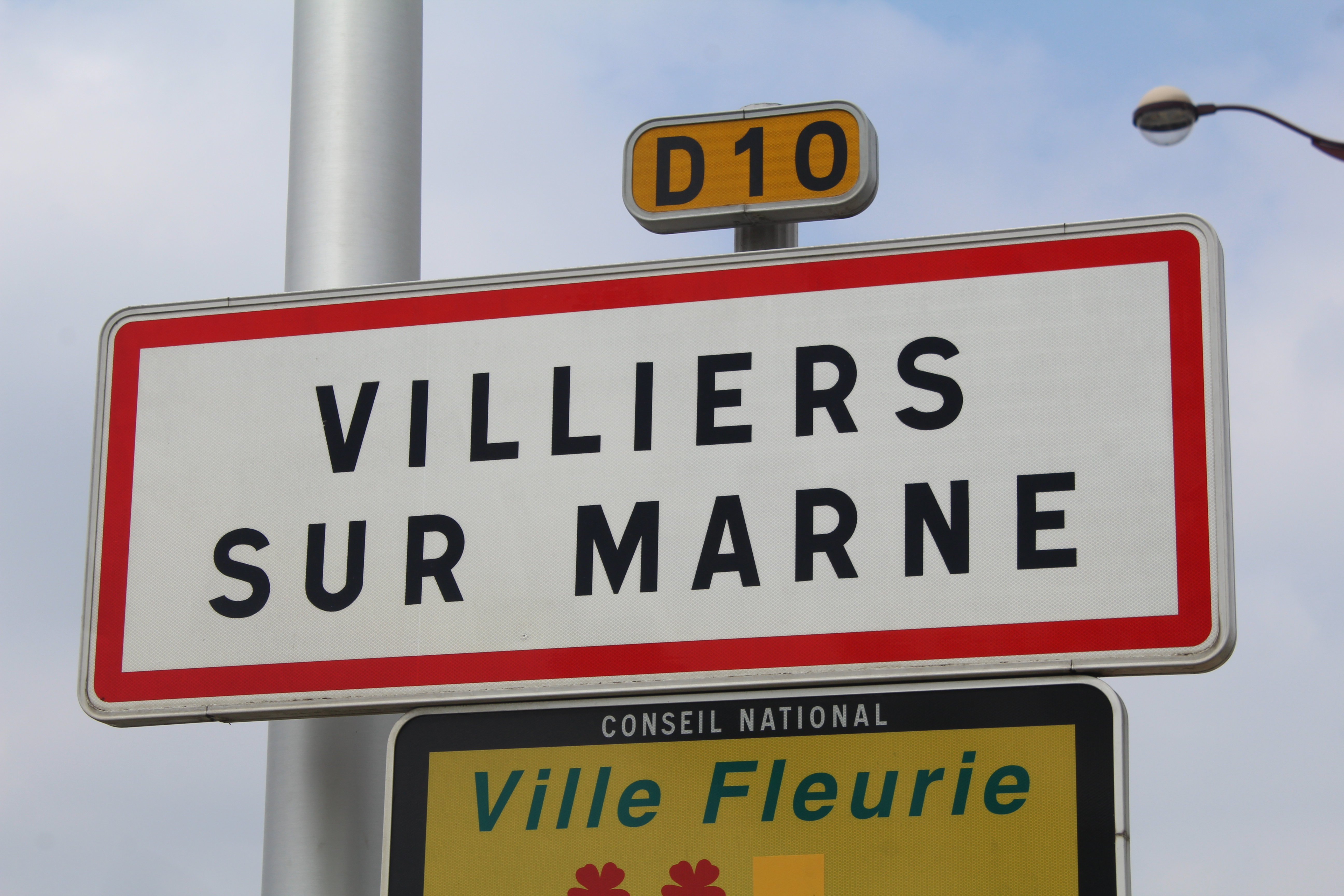 Panneau d'entrée dans Villiers-sur-Marne.